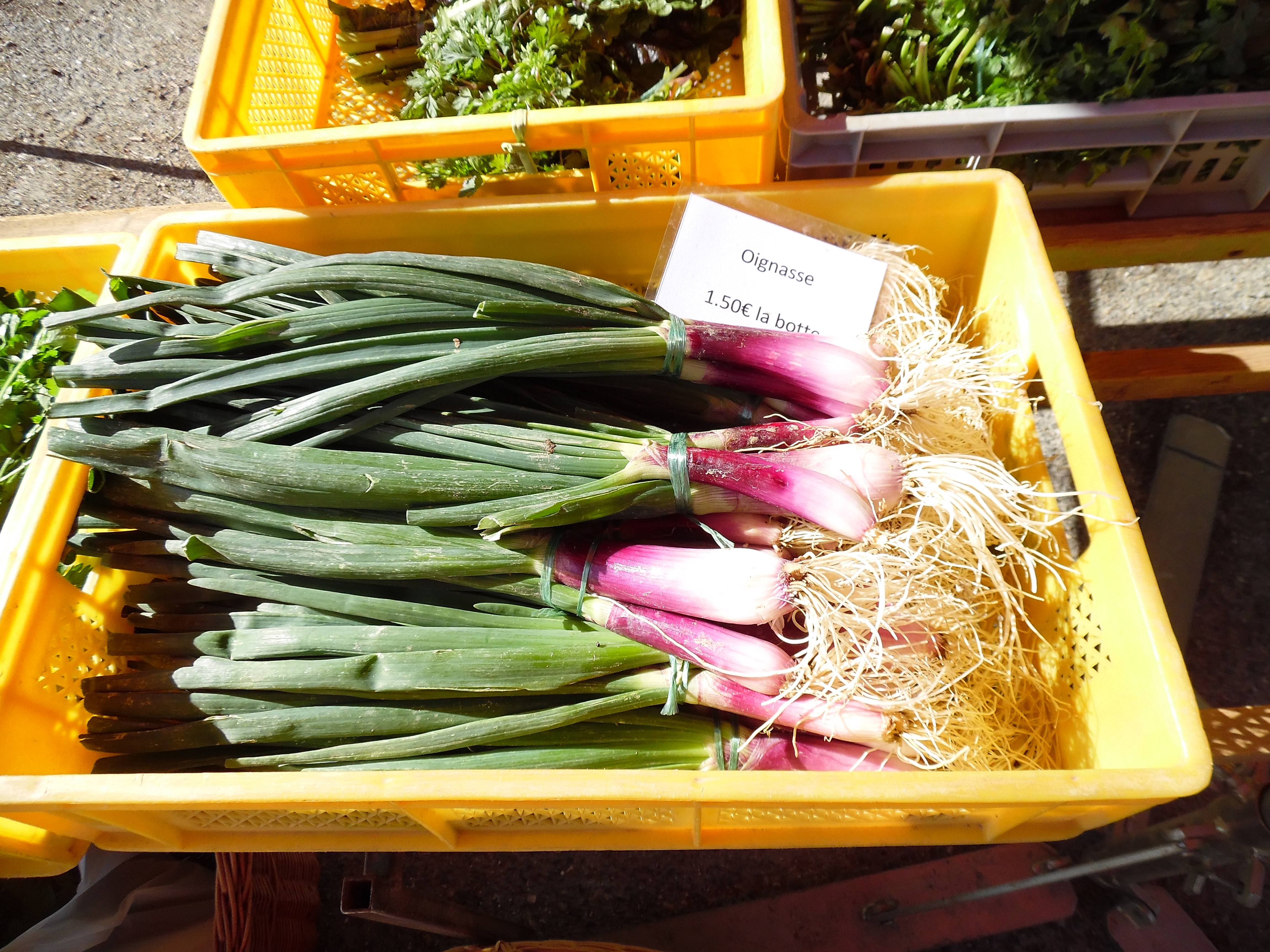 Onhoassas suu mercat d'Amor, Shalossa, Gasconha